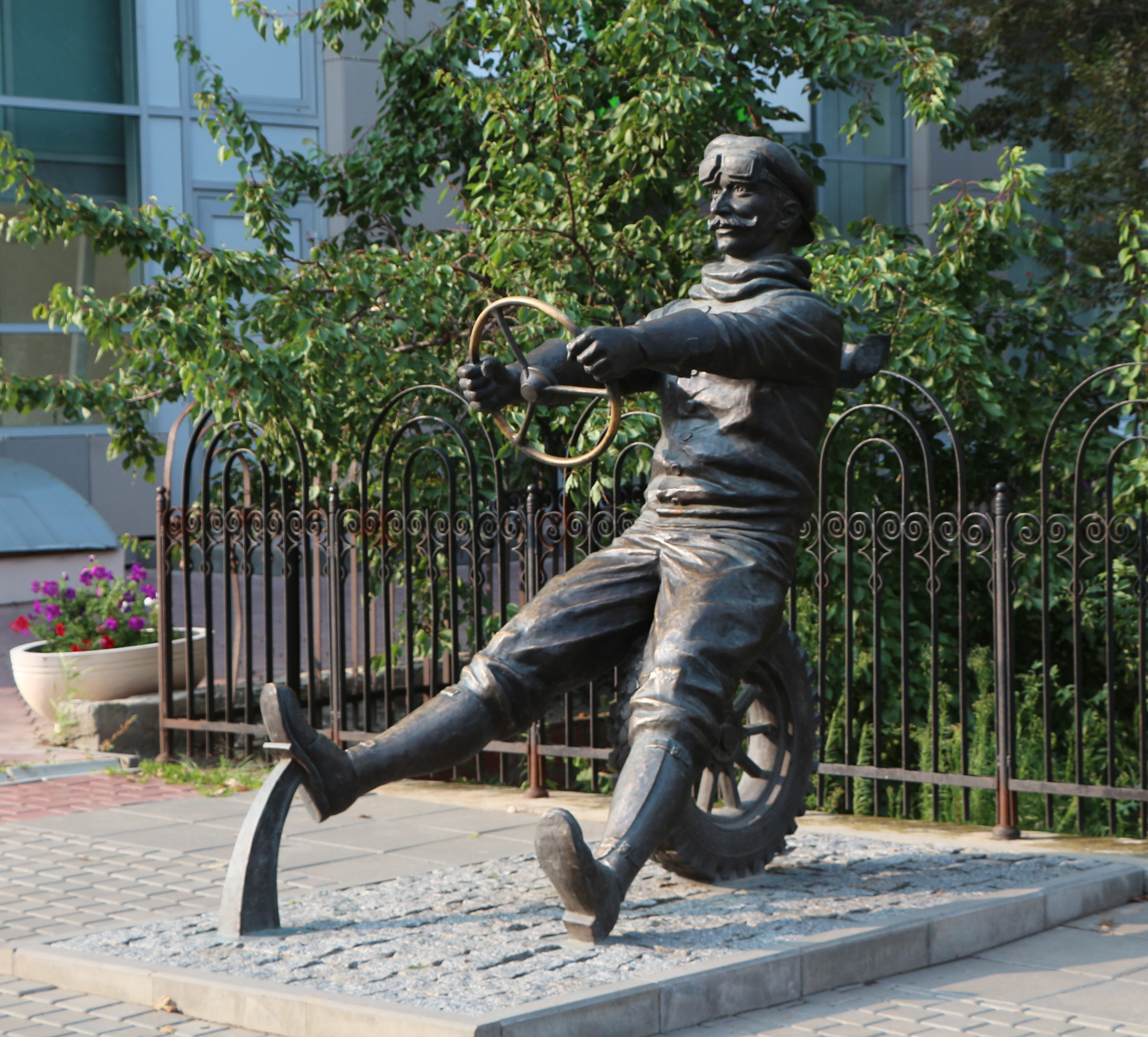 Адам Козлевич. Памятник автомобилисту в Волгограде на Комсомольской.